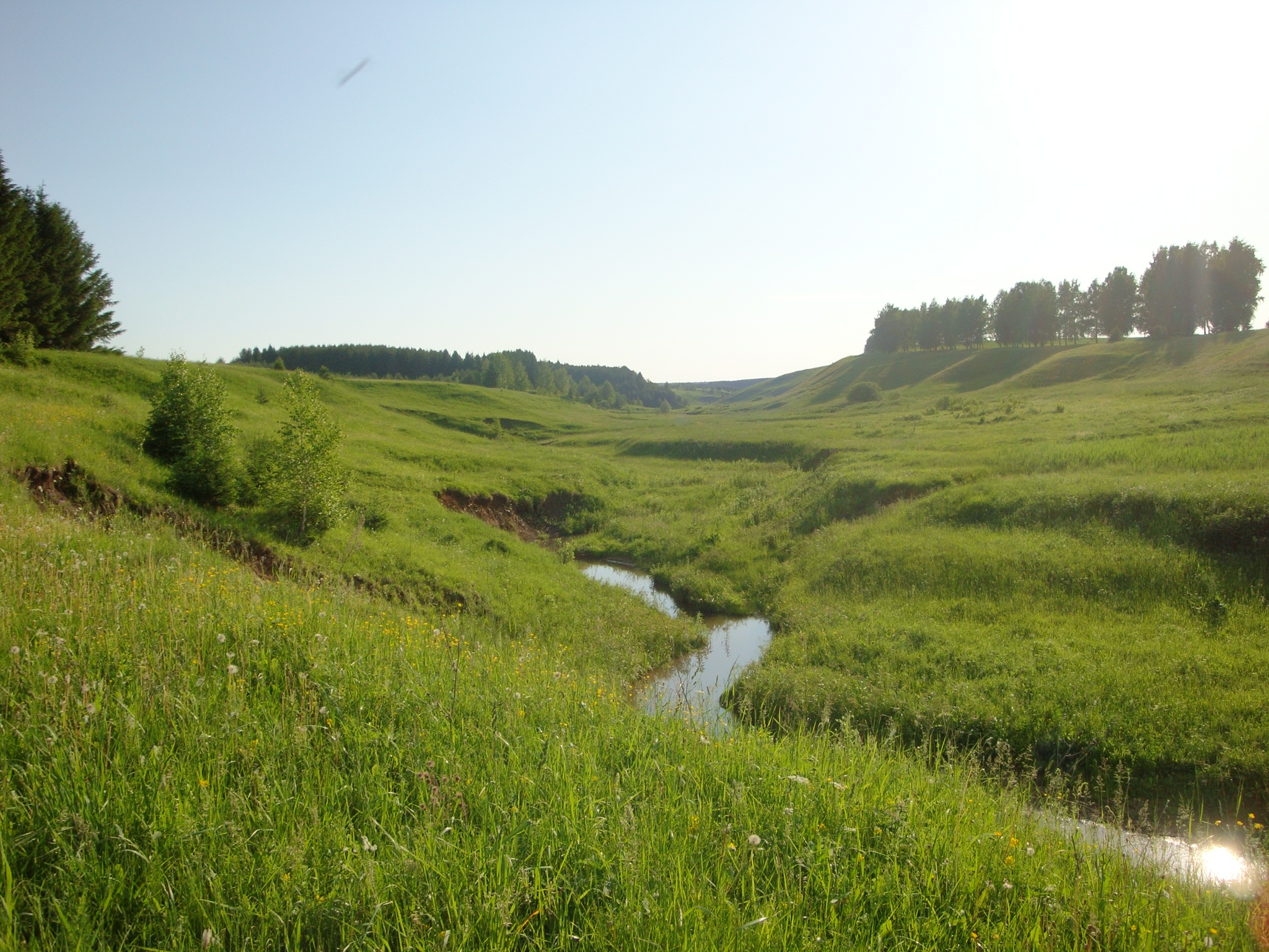 Тулушка (Сабинский)